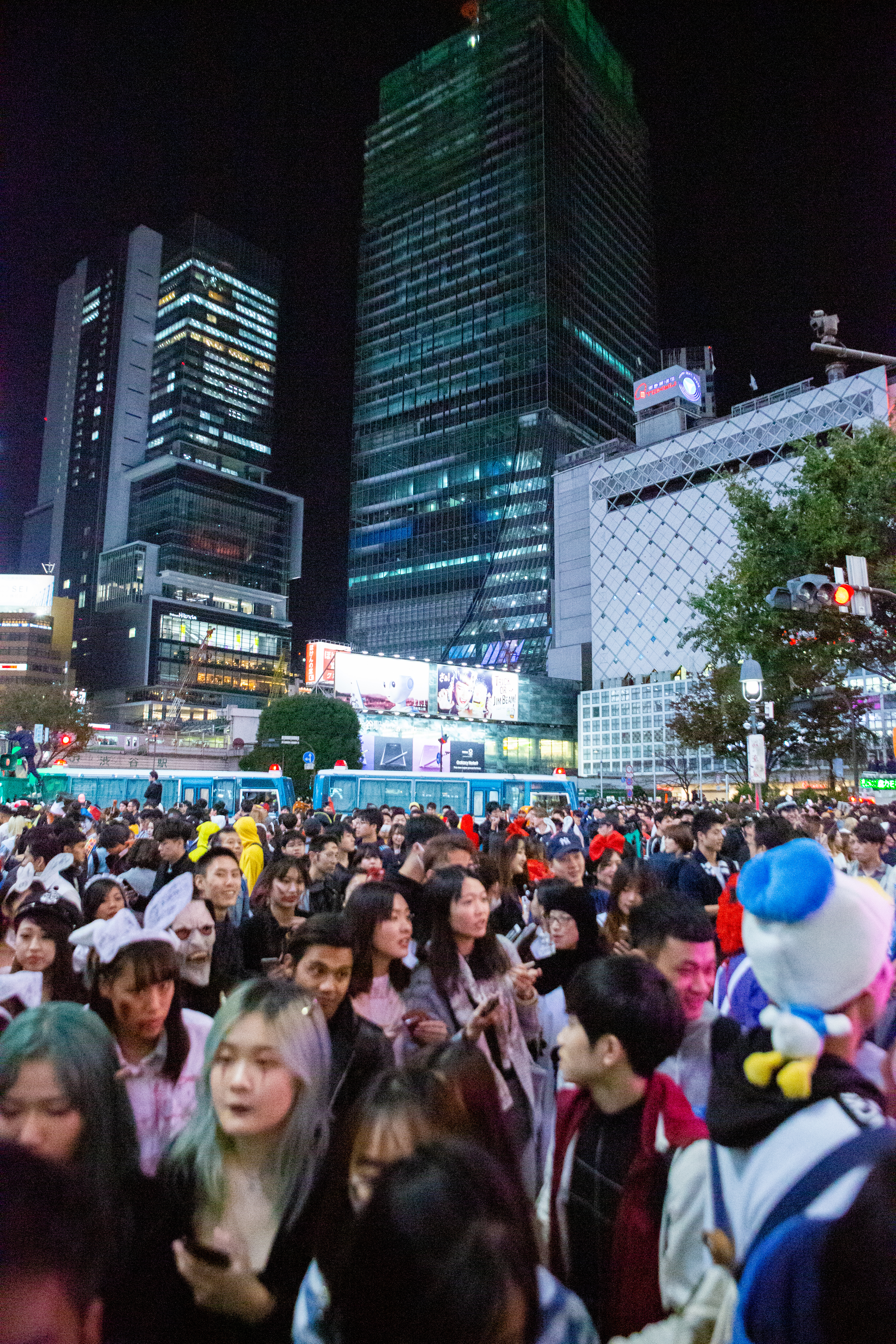 渋谷 ハロウィン 2018 (10月31日)